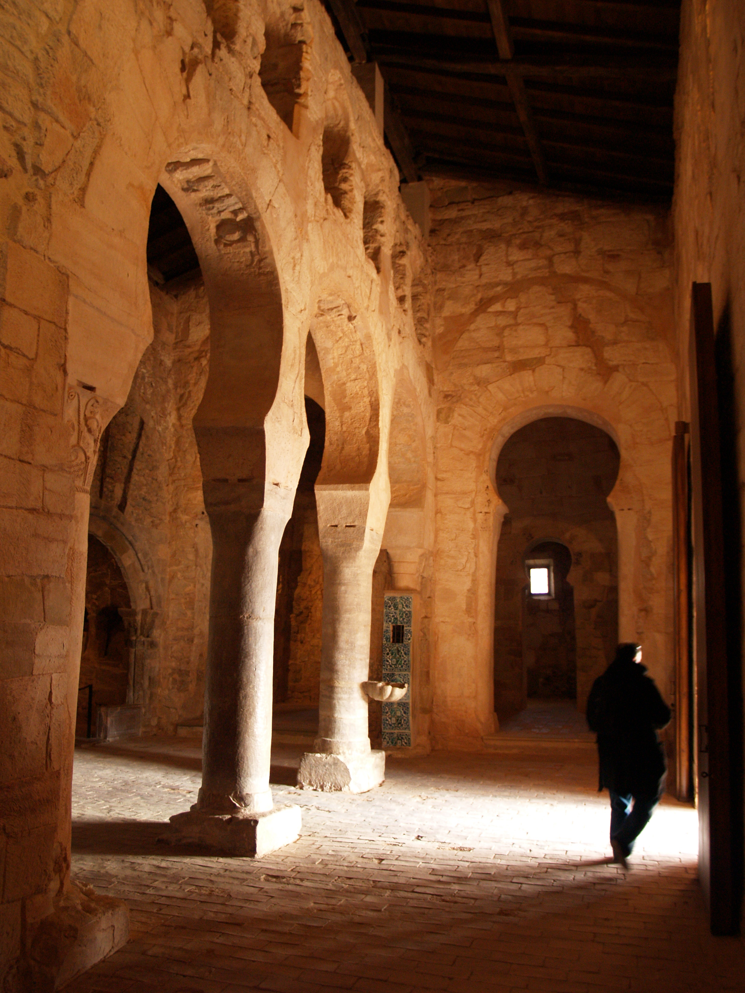 Interior del Monasterio de San Millán de Suso.